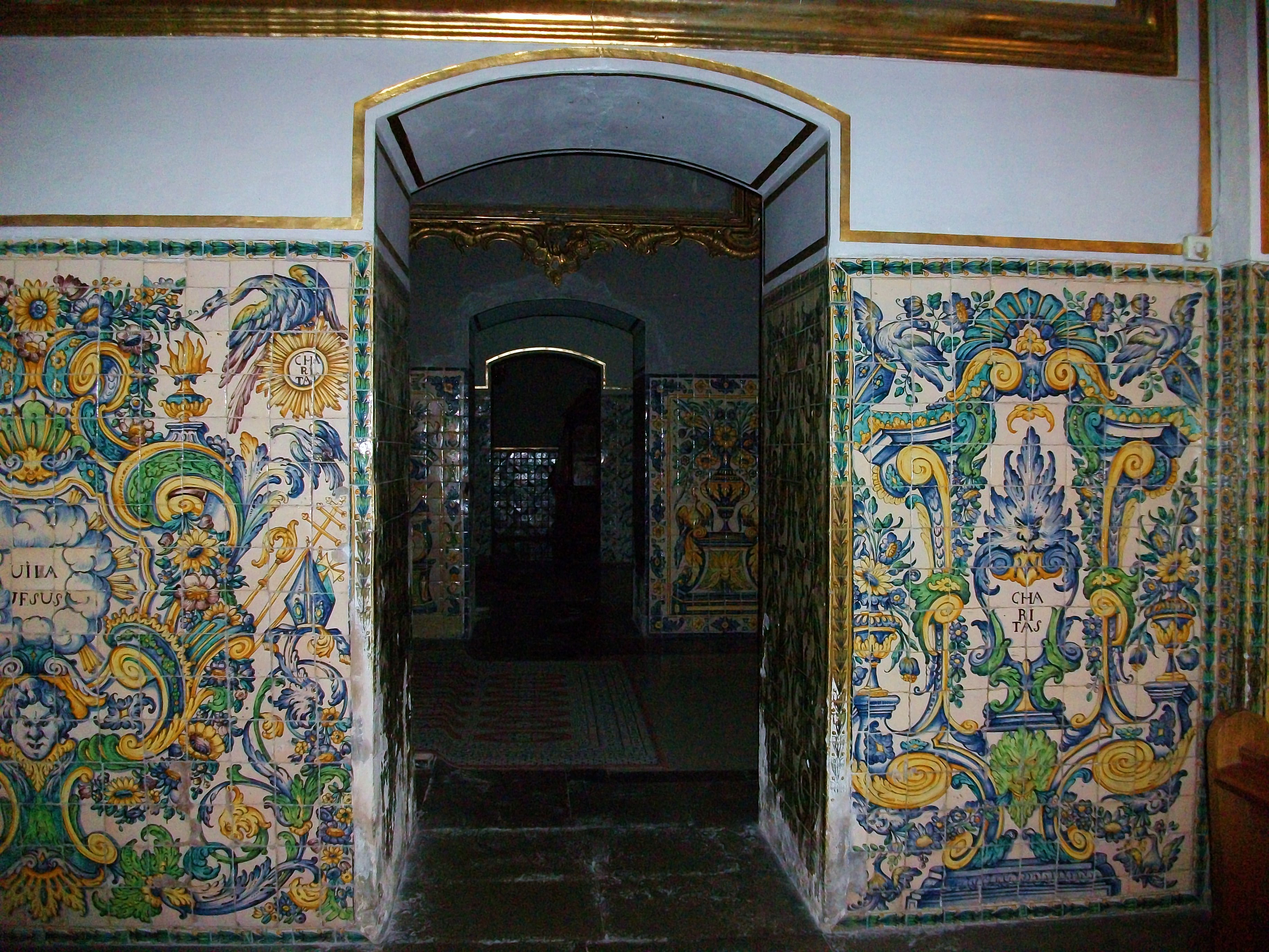 Sòcol de ceràmica (s. XVIII) de l'església de Sant Sebastià i sant Miquel de València.